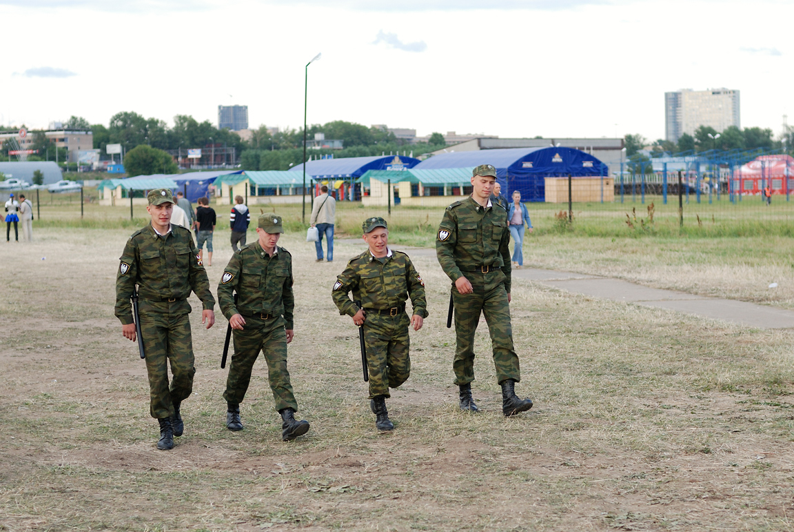 Internal Troops (Внутренние войска МВД России)